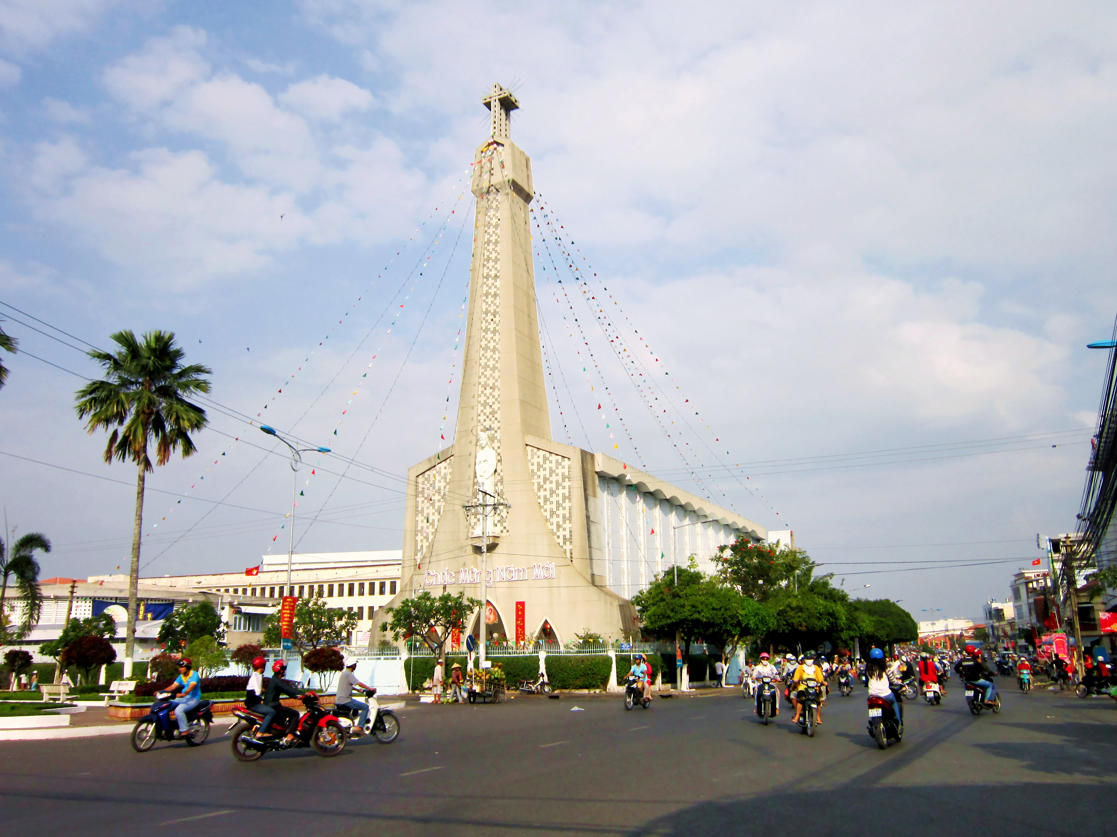 Nhà thờ chính tòa thành phố Long Xuyên (An Giang, Việt Nam)